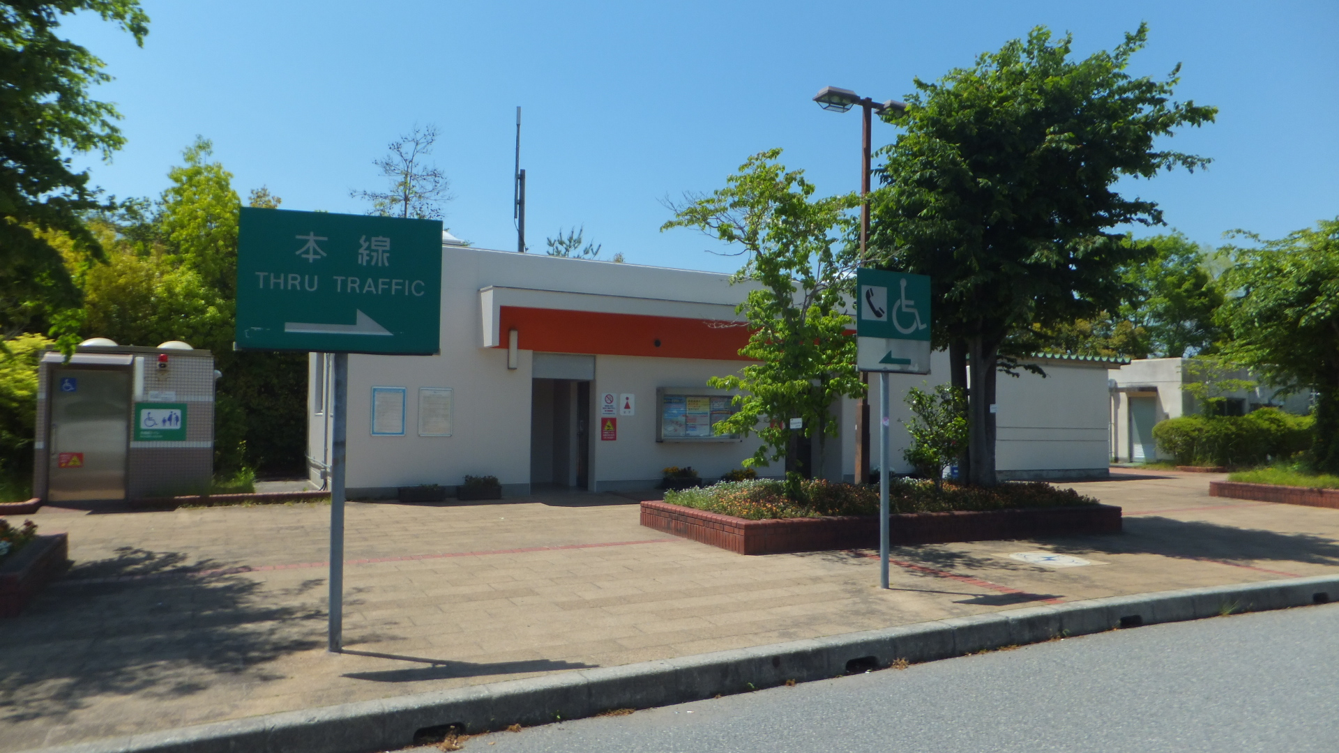 上荒川パーキングエリア